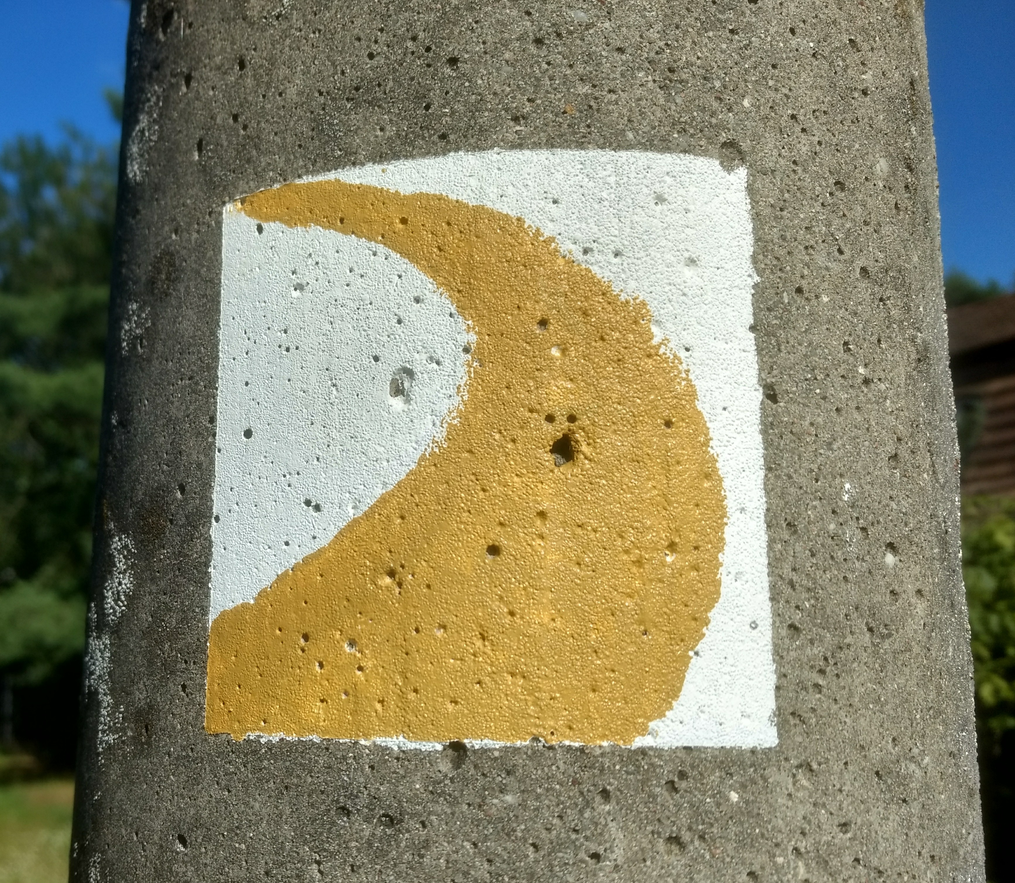 Symbol des Paul-Gerhard-Weges auf einem Laternenpfahl gegenüber vom Wasserturm in Eichwalde